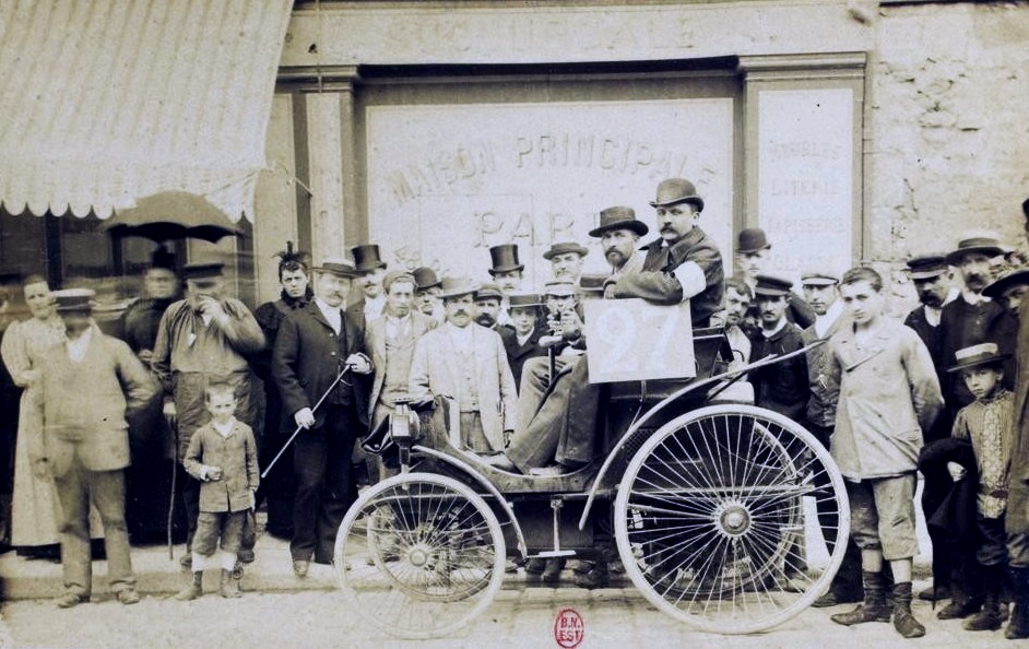 Voitures sans chevaux. Concours organisé par le Petit Journal, 22 juillet 1894, coll. R.Girard